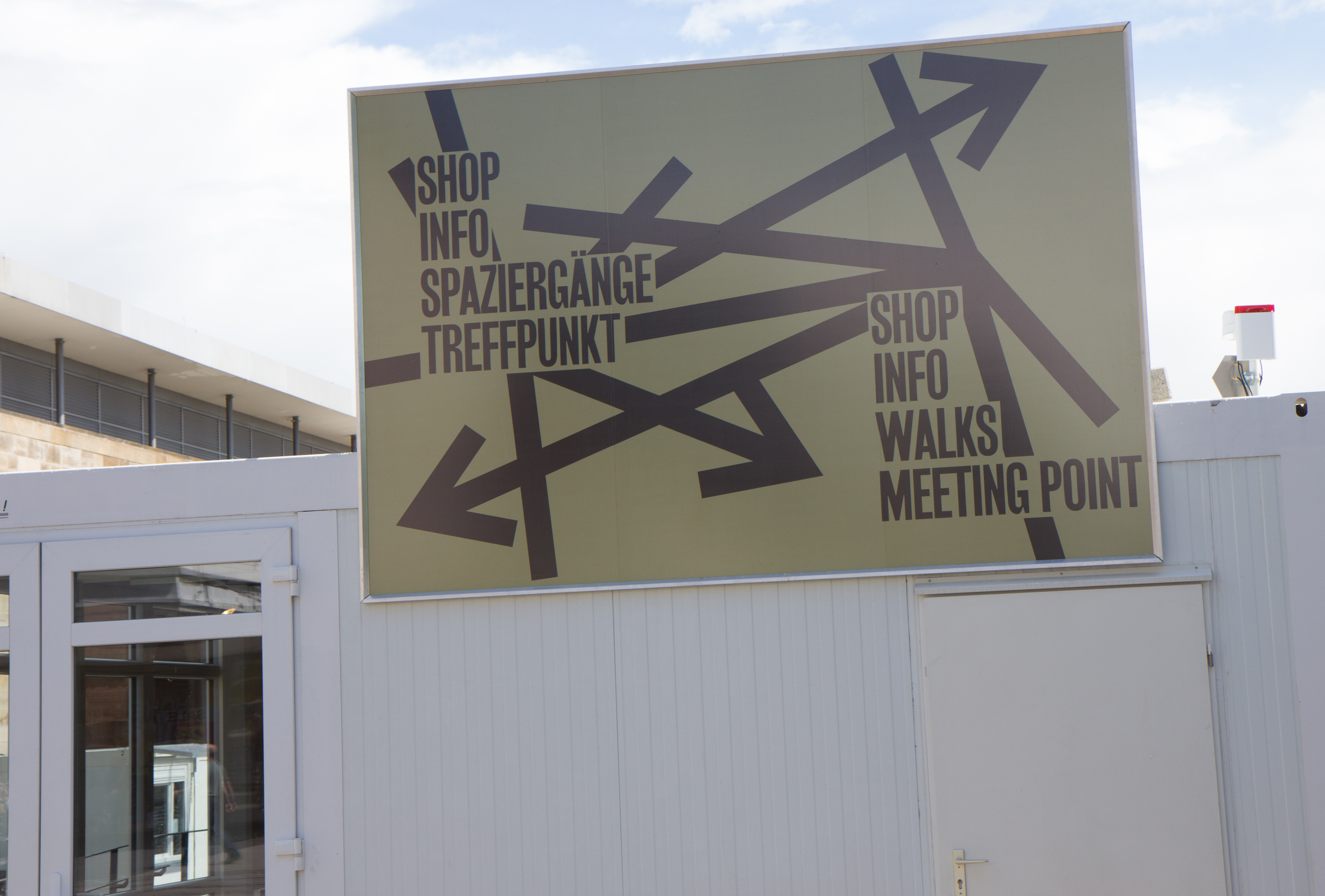 Documenta 14 in Kassel: Impressionen von den Ausstellungsorten